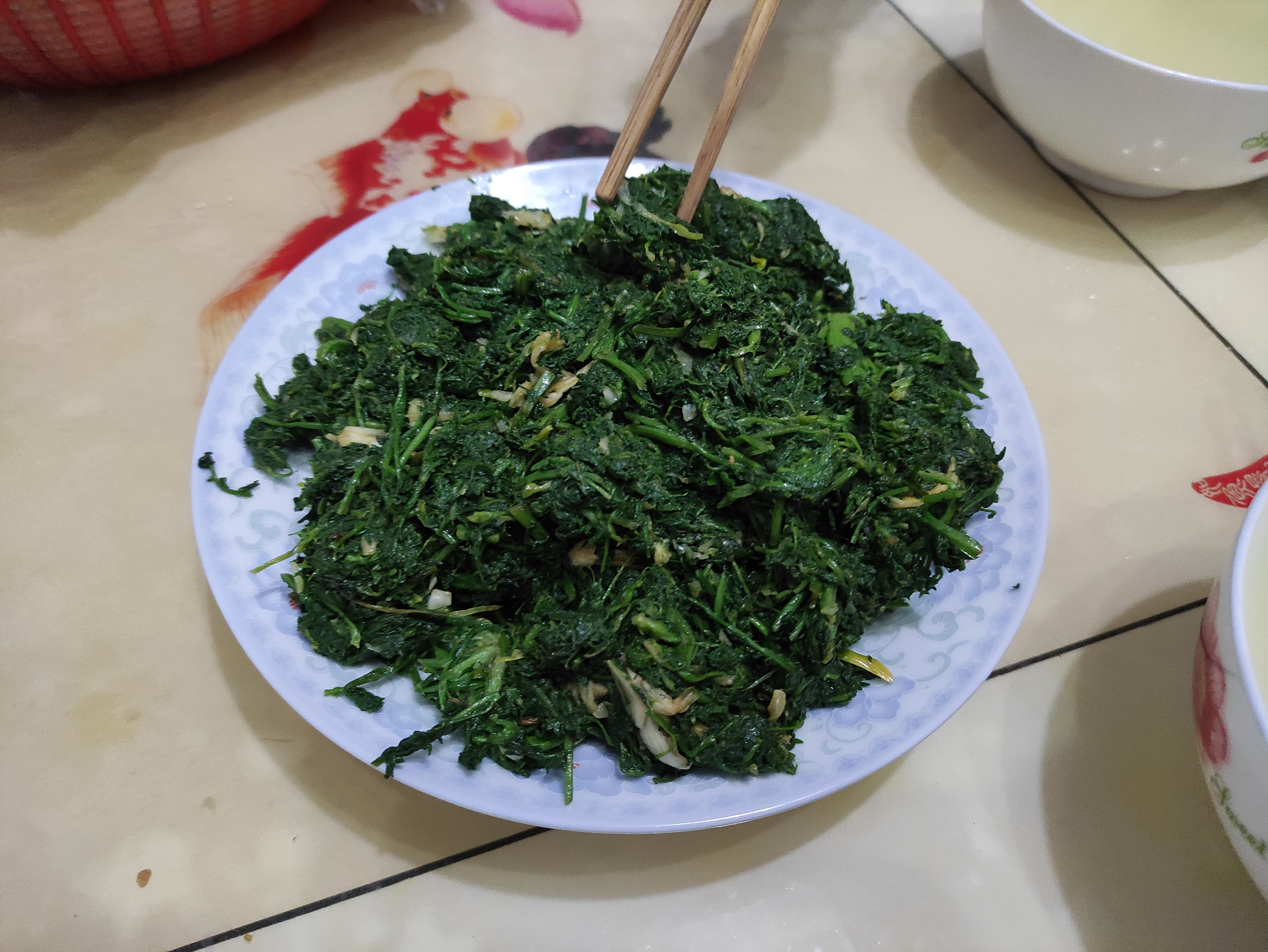 中文（中国大陆）: 播娘蒿，也称米米蒿、麦蒿、米蒿等，图为拌蒜食用的凉拌米米蒿，摄于中国山东省东平县，当地人有食用米米蒿的习俗